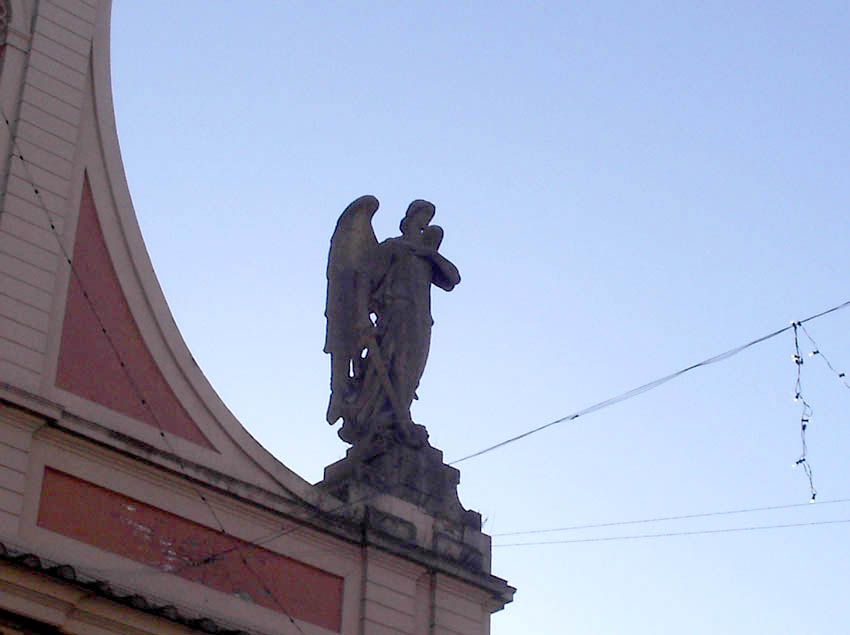 Castelfranco Emilia (MO) - Particolare della chiesa